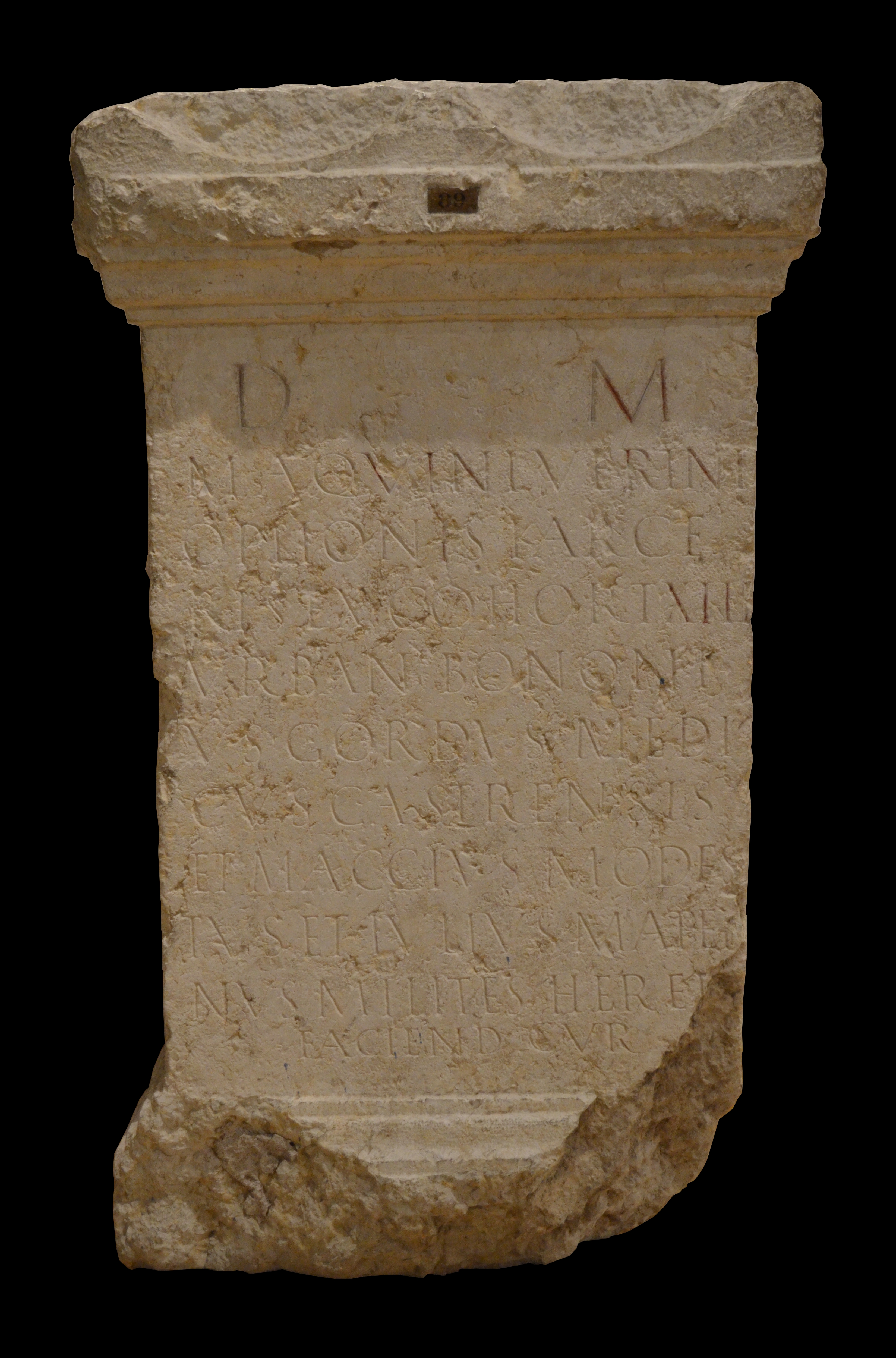 Musée gallo-romain de Fourvière (Lyon) - Cippe avec base et couronnement extrait en 1844 des fondations de l'ancienne église de Vaise à Lyon. Haut. 110cm ; larg. 67cm. D(iis) M(anibus) / M(arci) Aquini(i) Verini / optioni karce/ris ex cohort(e) XIII / Urban(a). Bononi/us Gordus medi/cus castrensis / et M(arcus) Accius Modes/tus et Iulius Mater/nus, milites, hered(es) / faciend(um) cur(averunt). Aux dieux Mânes de Marcus Aquinius Verinus, optione de la prison de la XIIIe cohorte Urbana, Bononius Gordus, médecin du camp, Marcus Accius Modestus et Julius Maternus, soldats (de la même cohorte), ses héritiers, ont pris soin d'élever (ce tombeau)